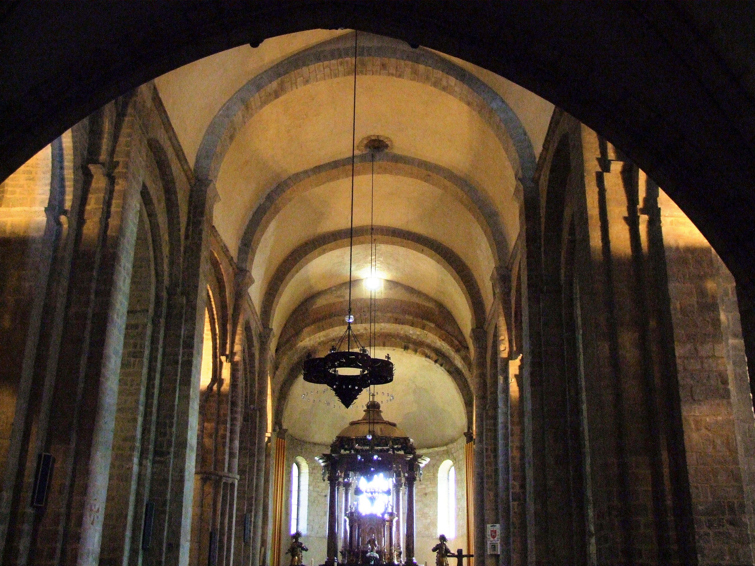 Elne - Cathédrale - Nef